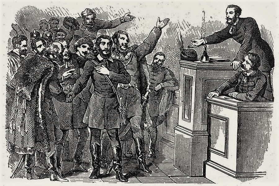 Kossuth kormányzóvá választása, 1849. április